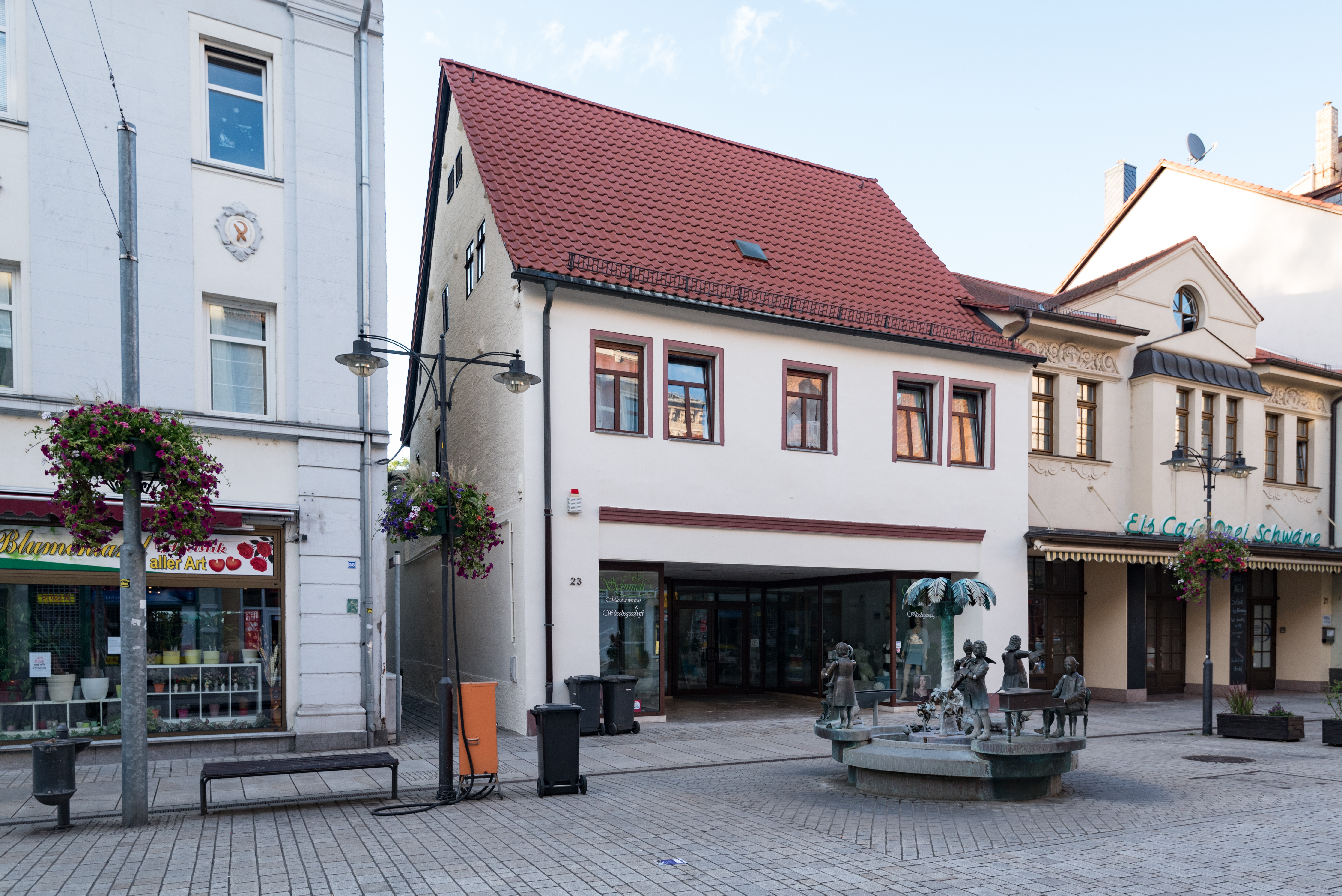 Weißenfels, Jüdenstraße 23